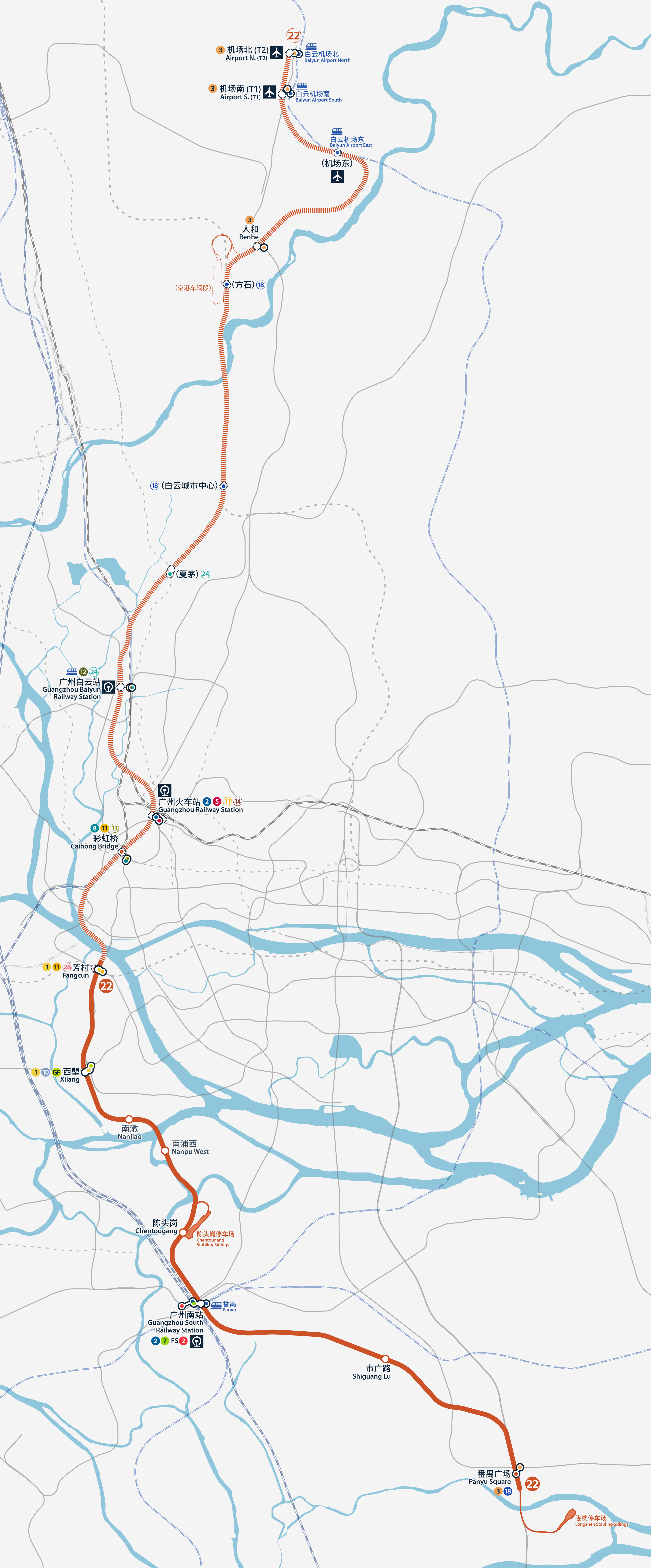 廣州地鐵22號線路線圖，按真實走向比例繪畫